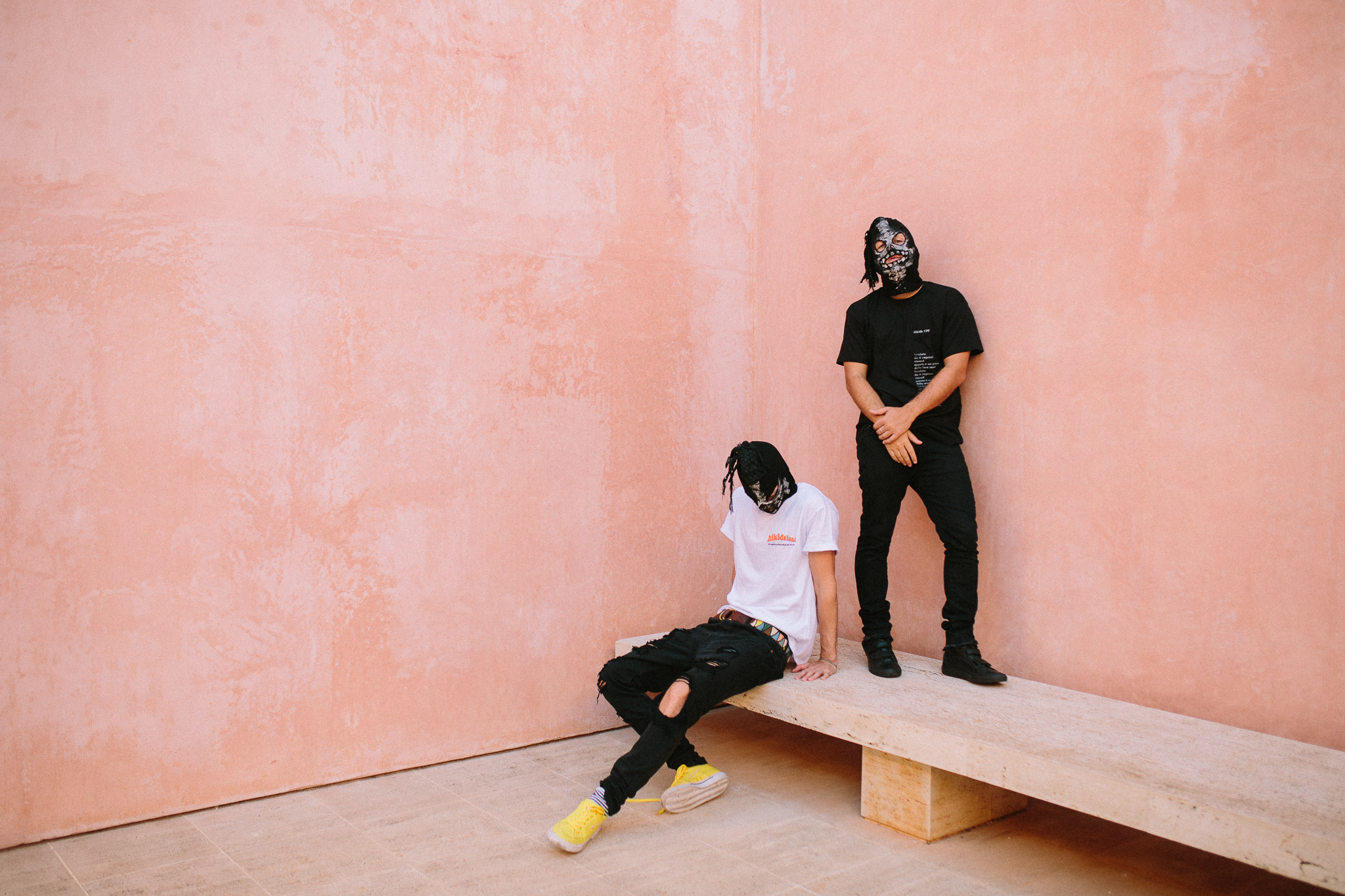 Pressefoto von Genetikk 2016